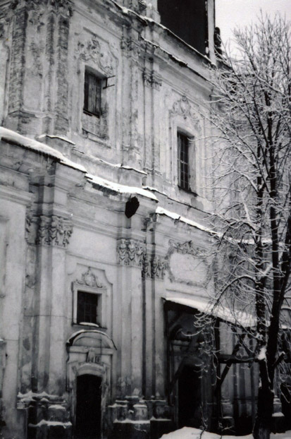 Монастир у Городищу.